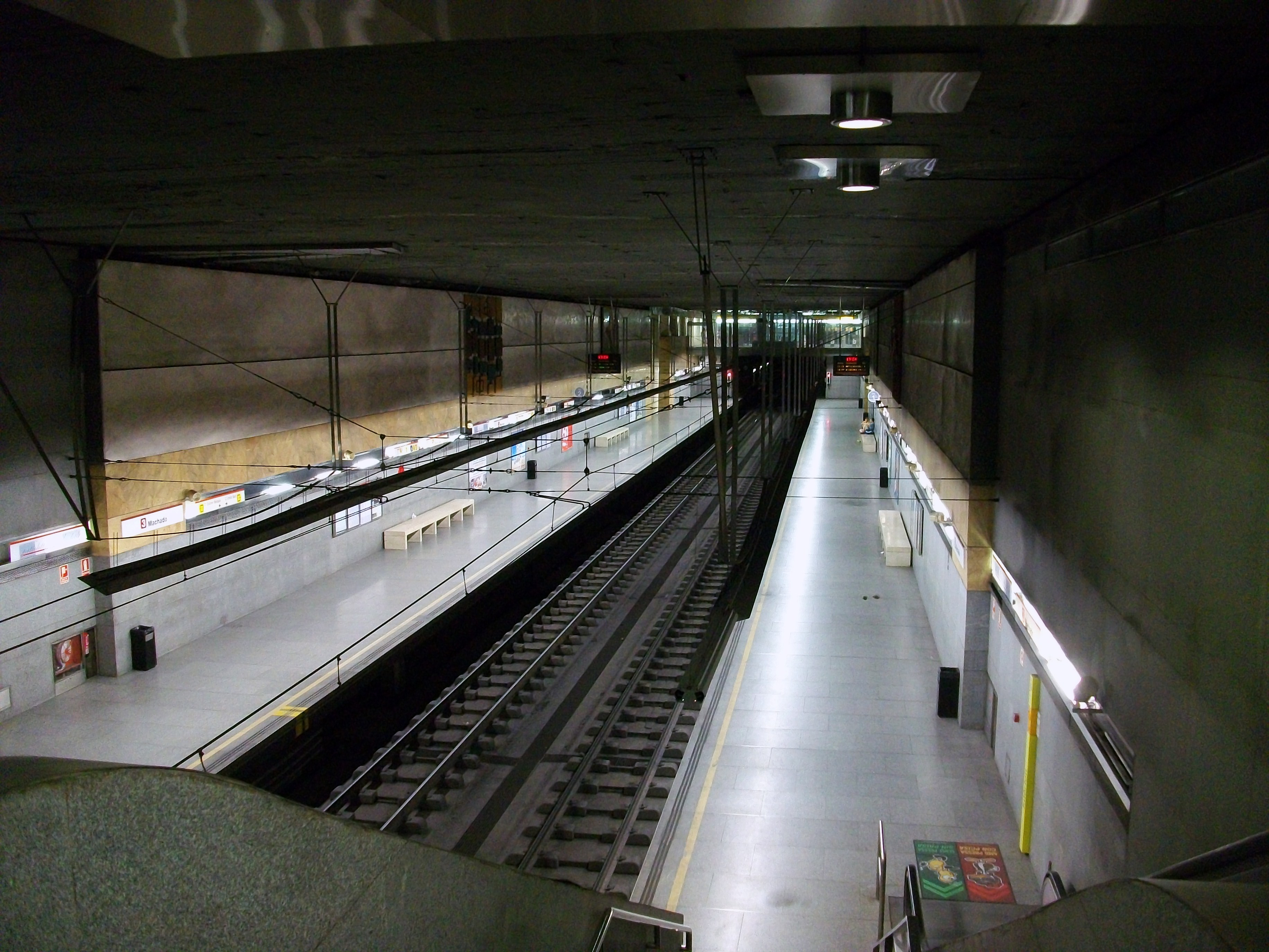 Estació de Machado del MetroValència.